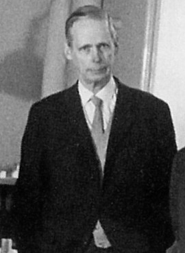 Bo Hertzman-Ericson, svensk ingenjör.